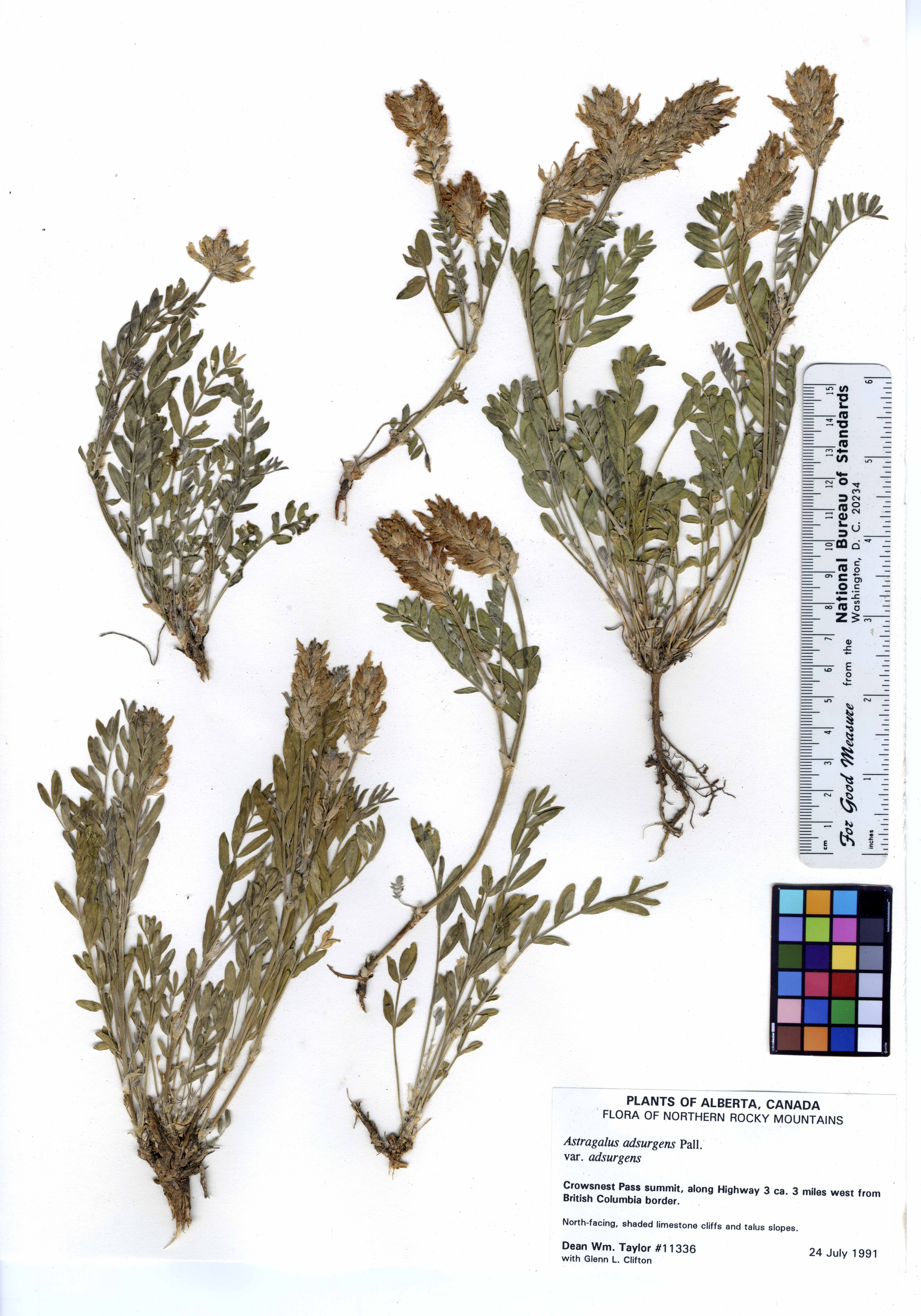 Astragalus adsurgens var. adsurgens